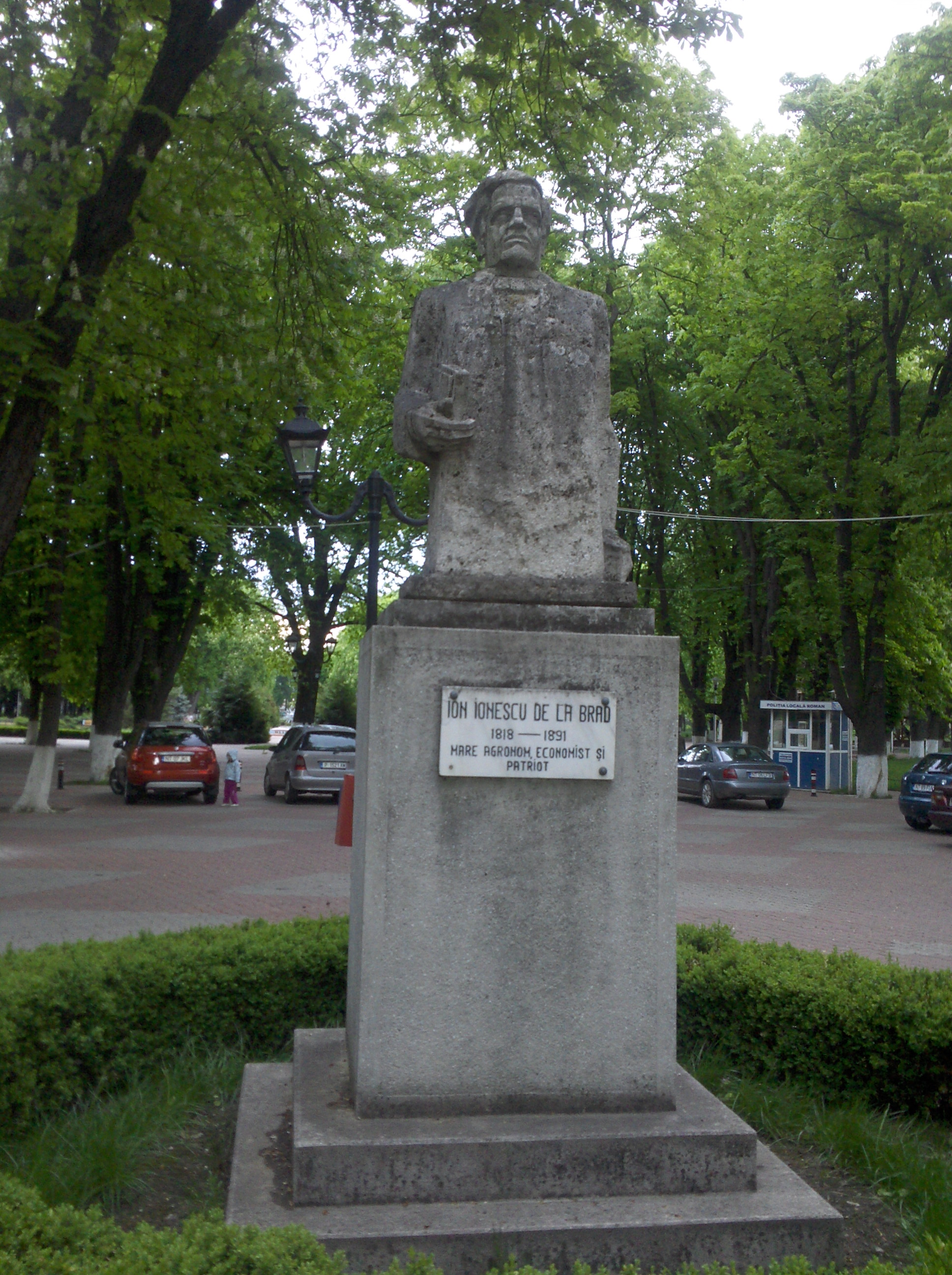 estatua de i.ionescu de la brad del parque de roman